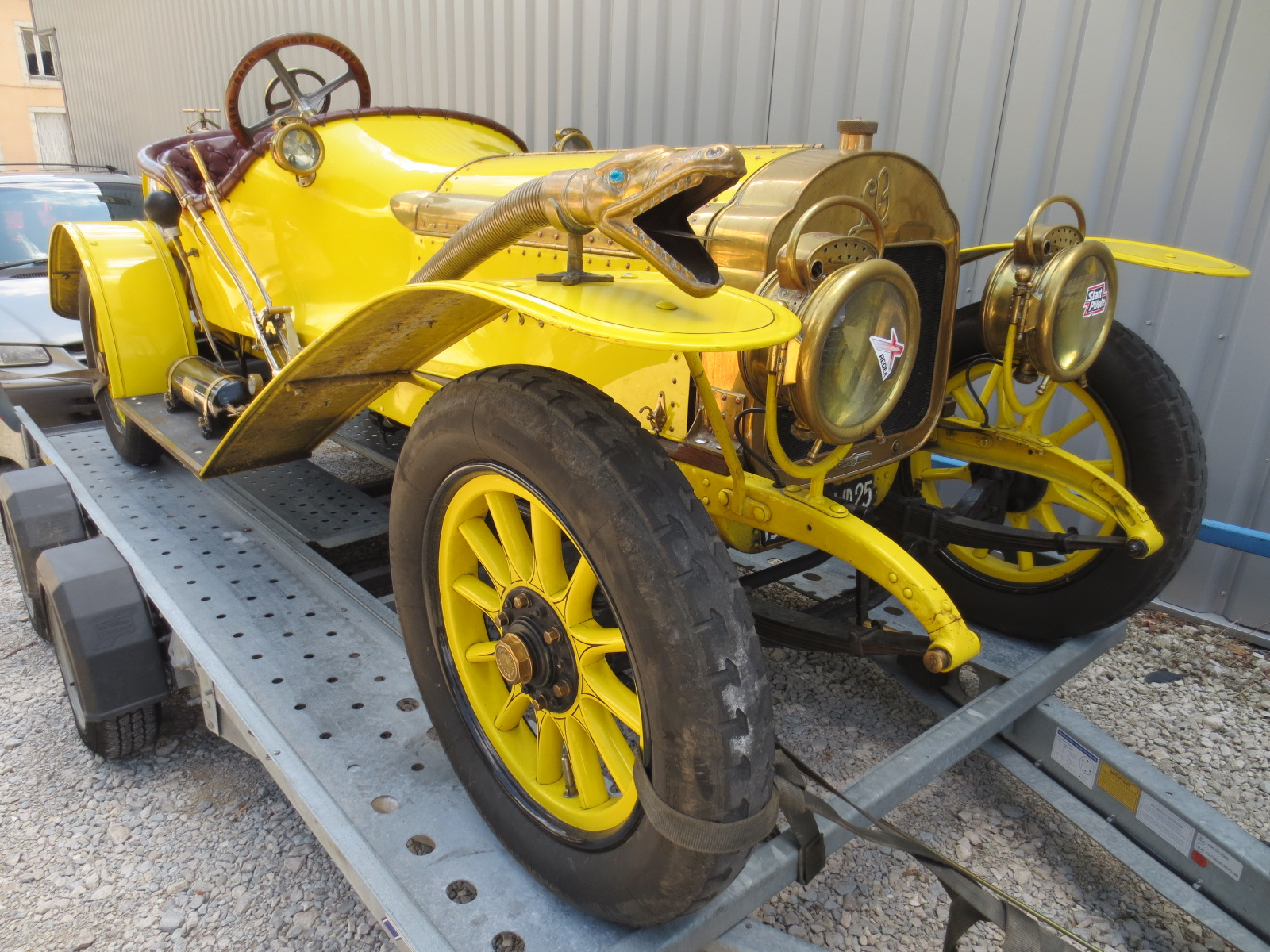 Leon Bollee G3